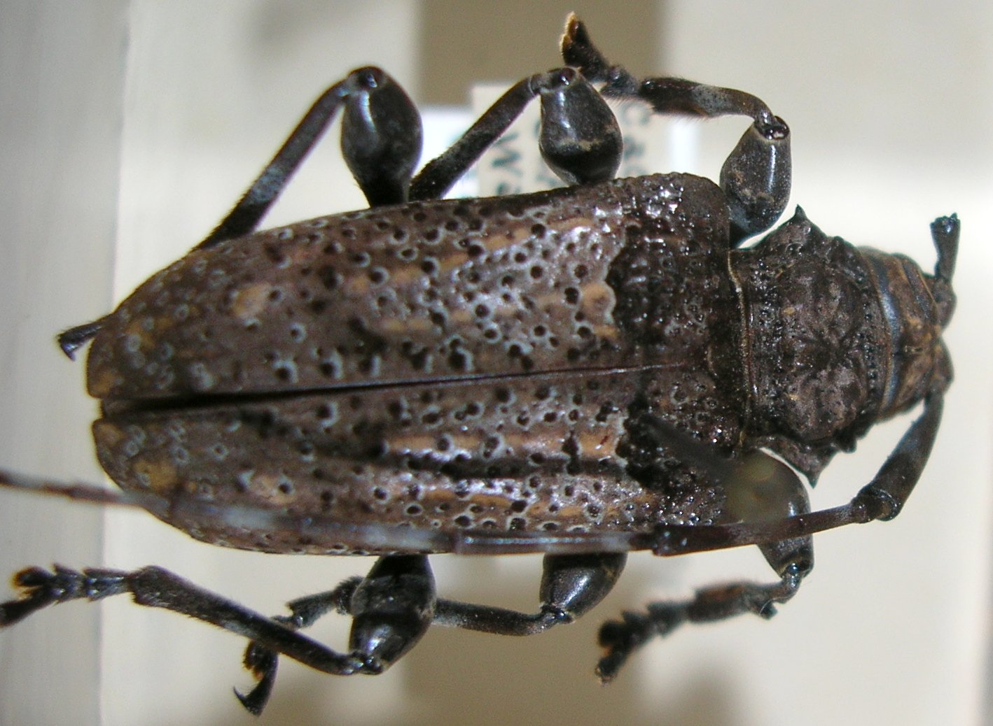 Archlagocheirus funestus = Lagocheirus funestus